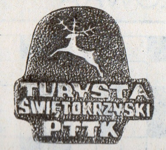 Odznaka krajoznawcza PTTK Turysta Świętokrzyski.